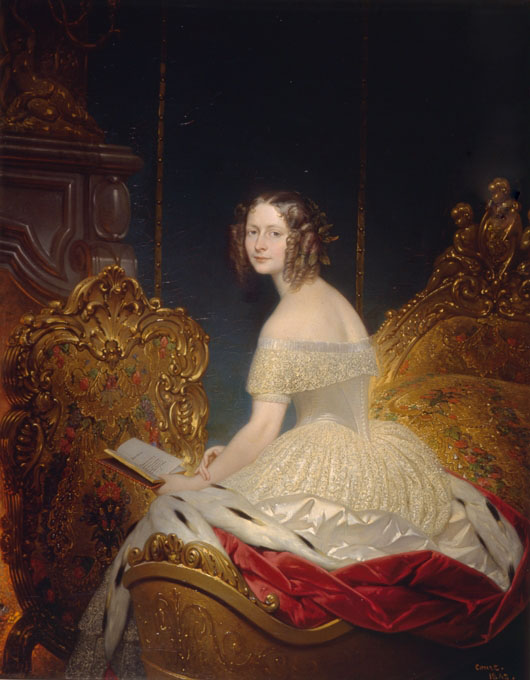 1842 Elena Pavlovna by Joseph-Desire Court (Russian Museum, St. Petersburg) Портрет великой княгини Елены Павловны Холст, масло. 178,5 х 141 Справа внизу подпись и дата: Court 1842. На верхней планке подрамника карандашом: М.Ю.-10; на нижней планке синим карандашом: 6000/ Г.Р.М. и бумажный ярлык: Музей города. Отд. Внутр. убр. помещ. О № 397. И.; штамп: Г.Р.М. инв. № 6000 (номер зачеркнут) Поступил: в 1929 из Музея города (особняк Н. Ф. Карлова, Ленинград); ранее - в собрании герцога Г. Г. Мекленбург-Стрелицкого; ранее - в собрании герцогини Екатерины Михайловны Мекленбург-Стрелицкой; ранее - в собрании великой княгини Елены Павловны; ранее - в собрании великого князя Михаила Павловича (Михайловский дворец)